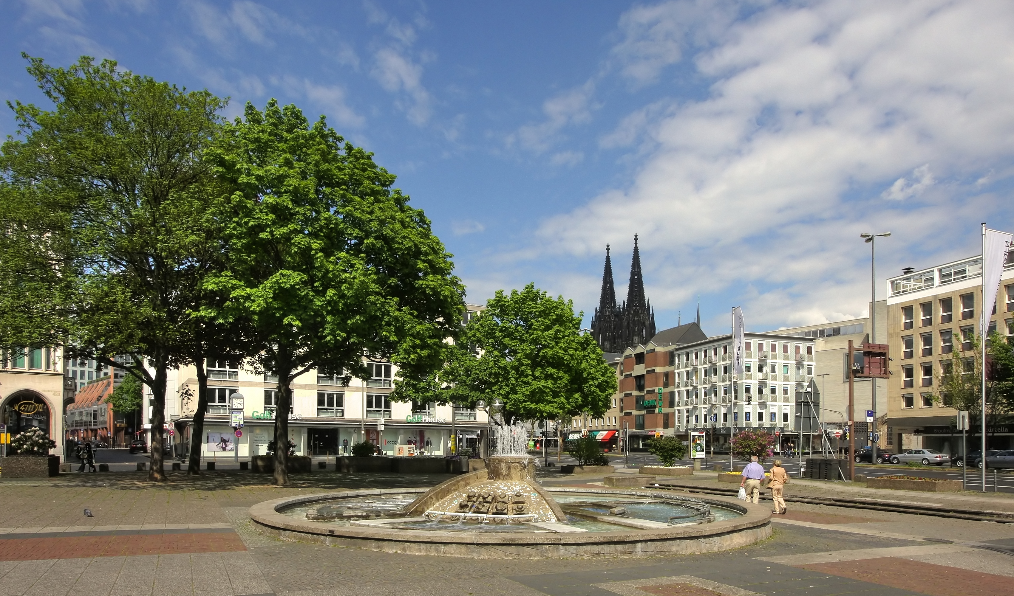 Offenbachplatz Köln mit Opernbrunnen: Kölner Dom im Hintergrund